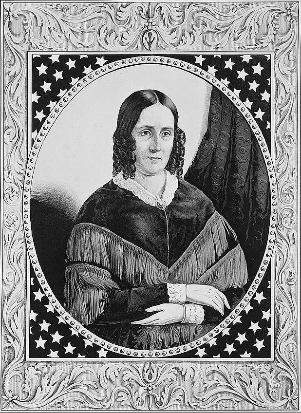 First Lady Sarah Polk